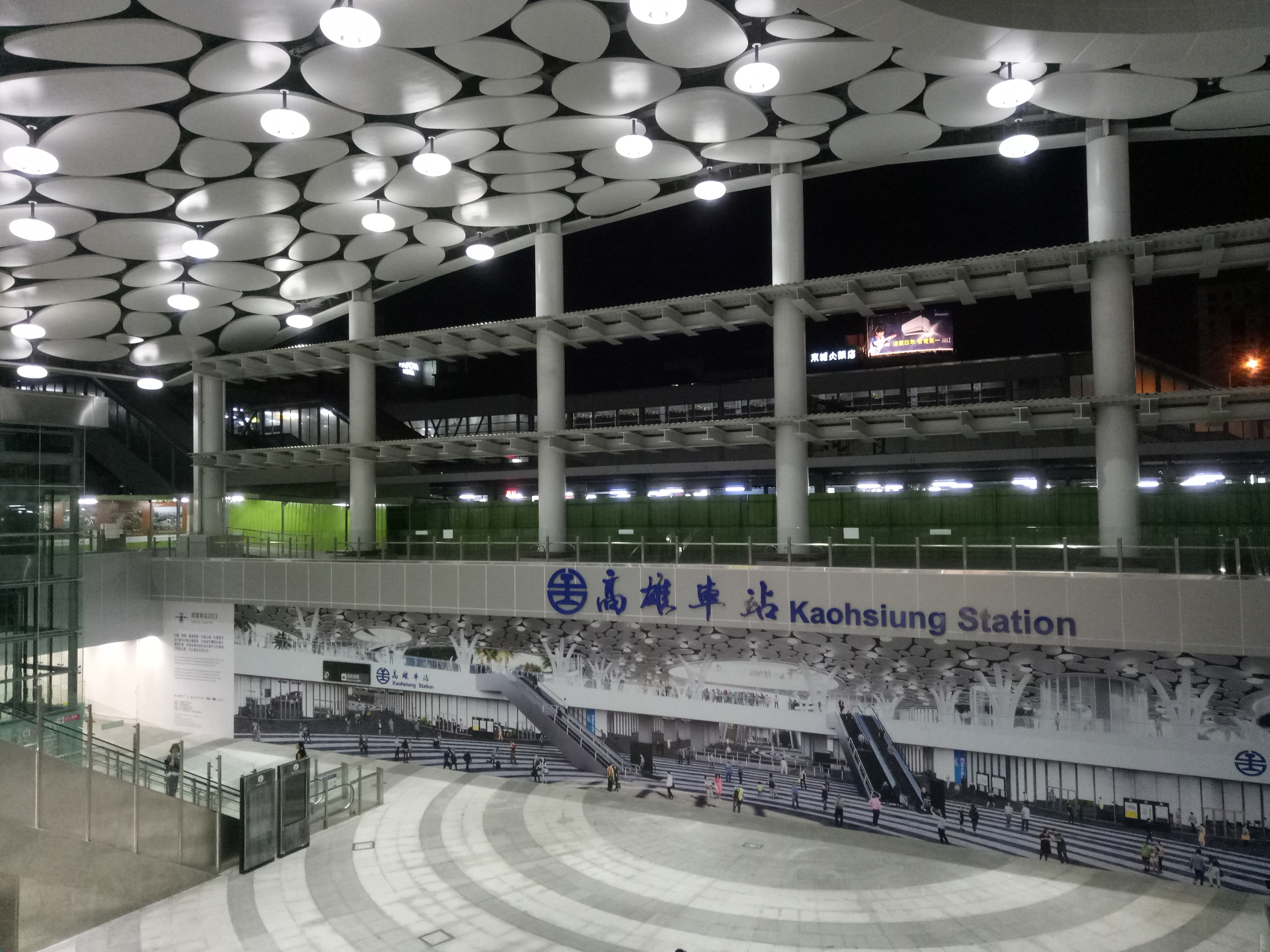 臺灣鐵路管理局高雄車站新站。